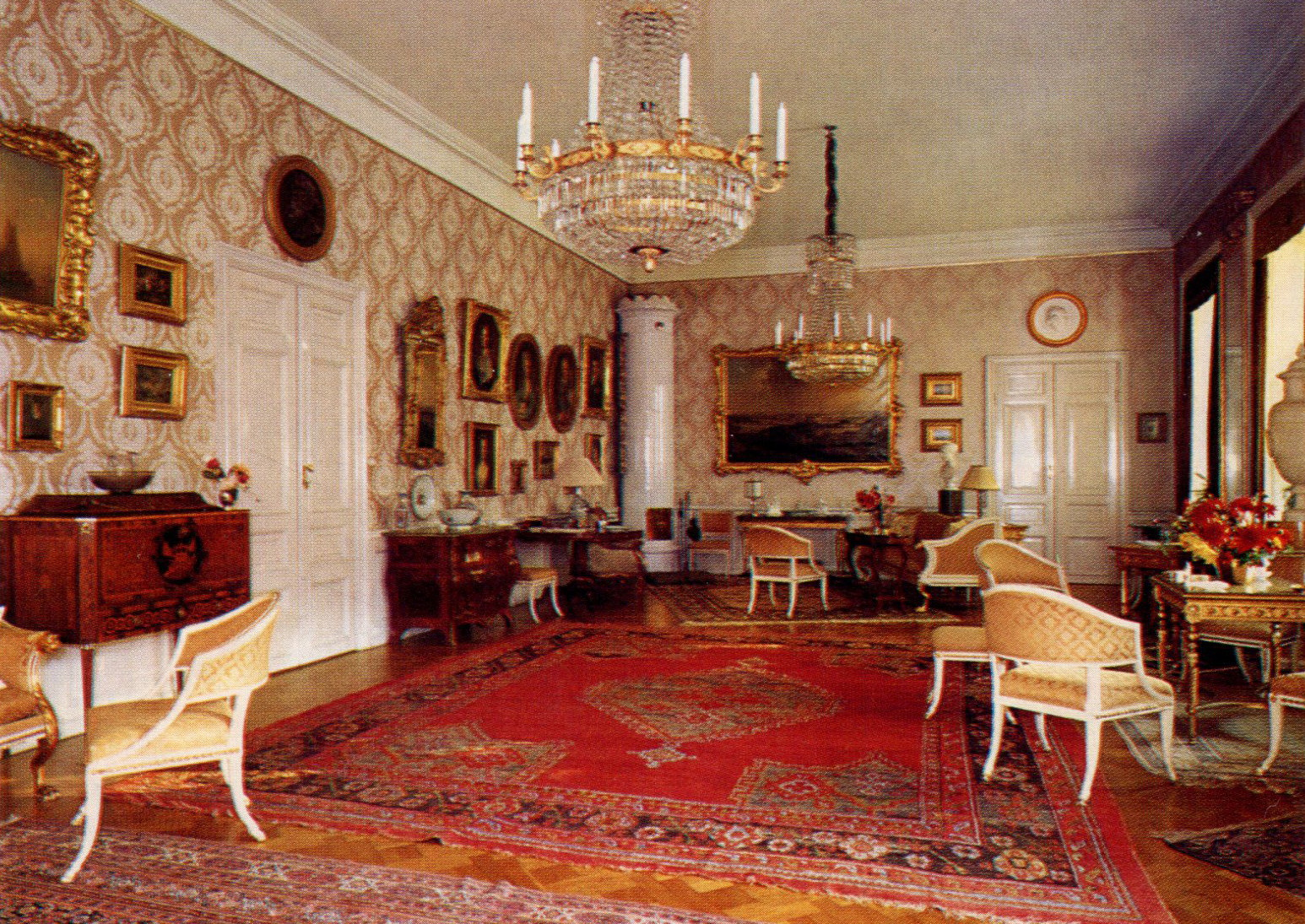 Stora salongen på Lennarsnäs